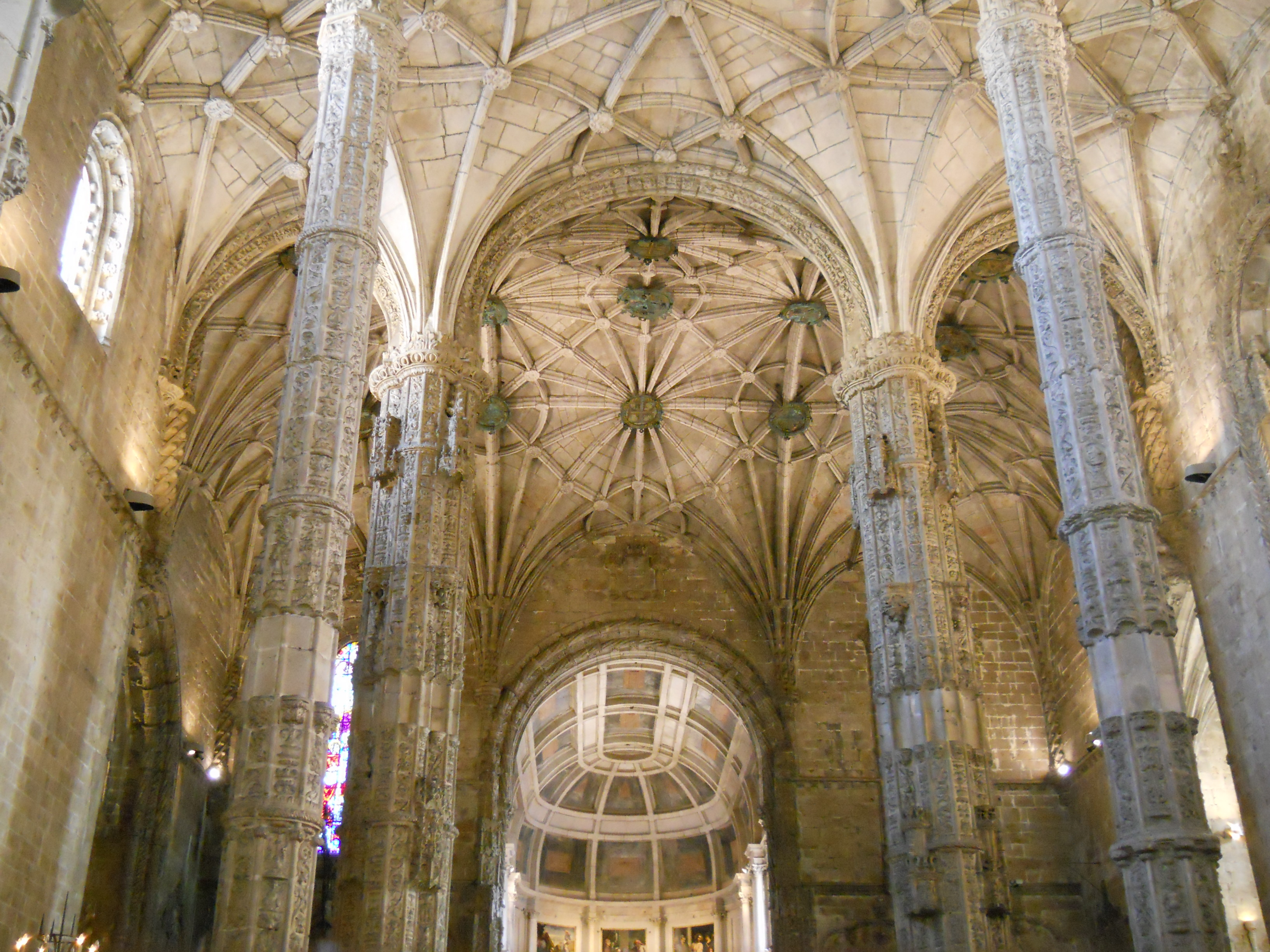 Lisbon Portugal 518 Jerónimos Monastery